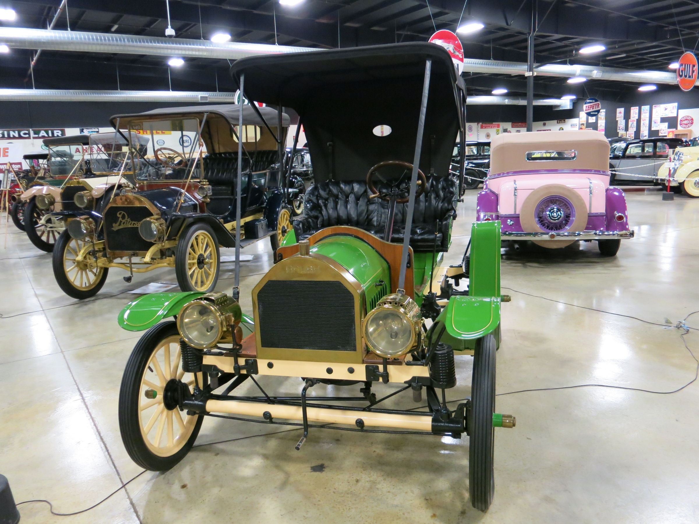 Tupelo Automobile Museum, Tupelo, Mississippi. Tupelo, Mississippi